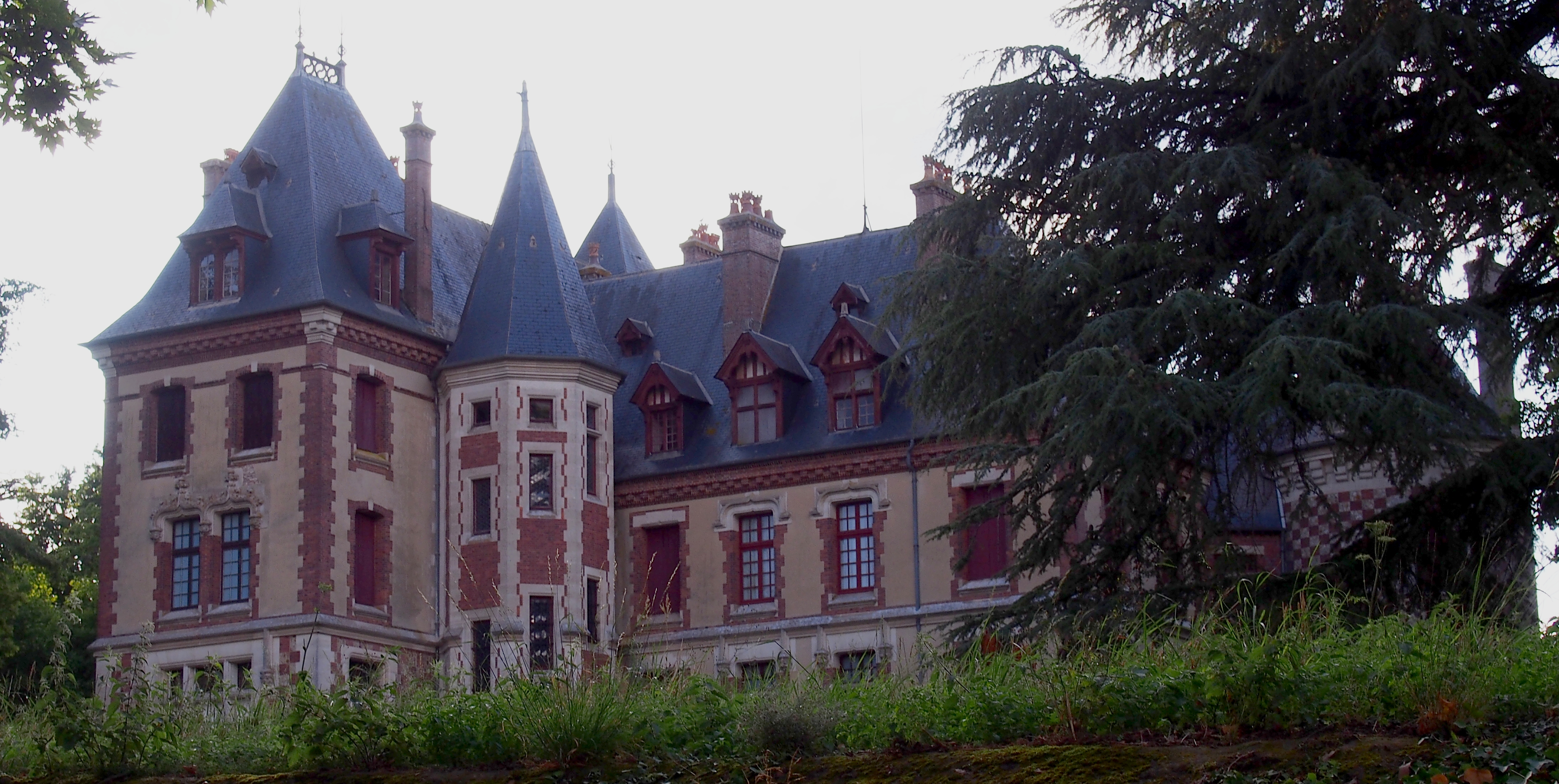 Courteilles (Normandie, France). Le château du Jarrier.